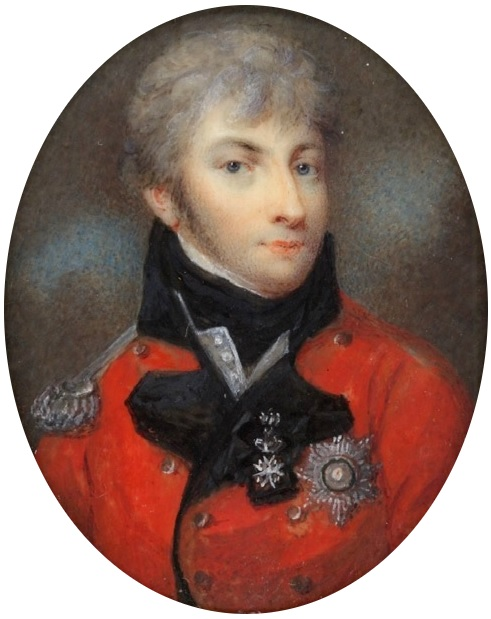 Książę Adam Jerzy Czartoryski (1770–1861). Moskiewskie Muzeum – Pałac Ostankino.